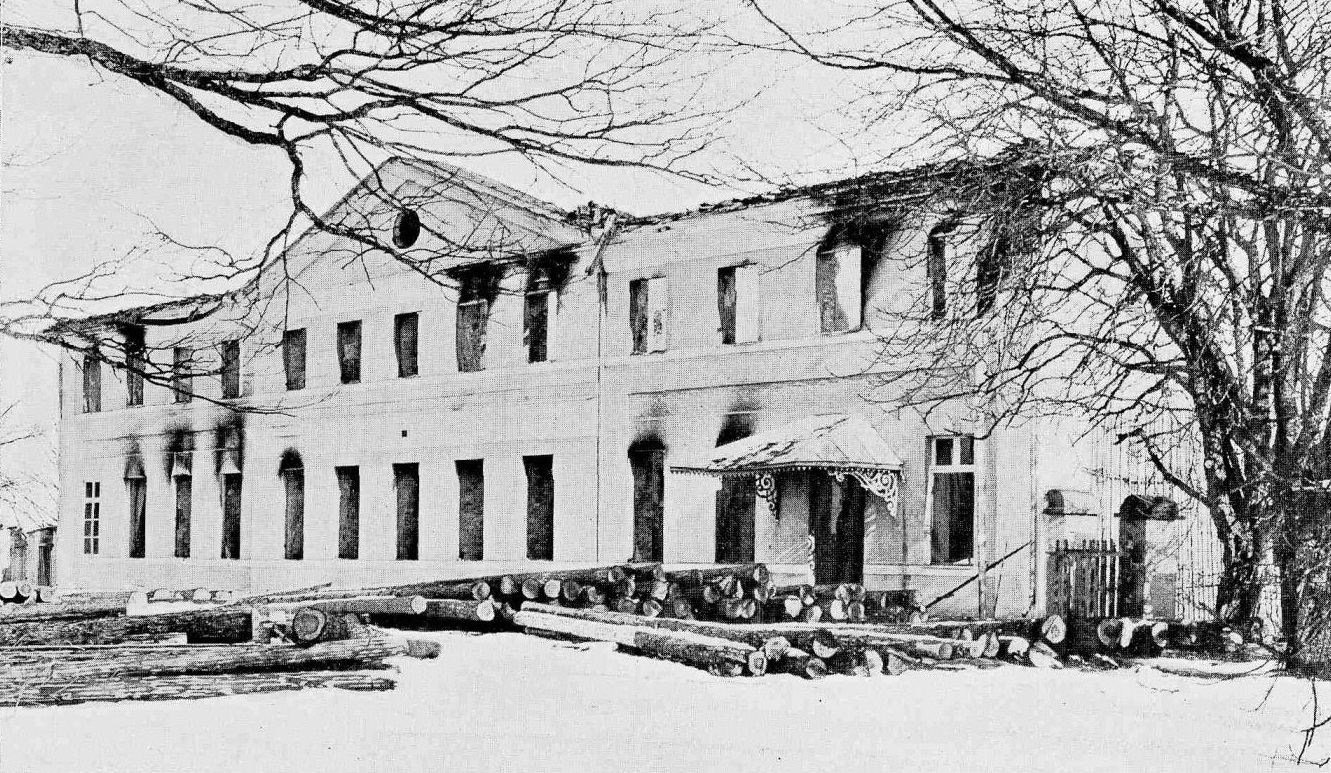 Litene mõisa peahoone pärast 1905. aasta põlengut.